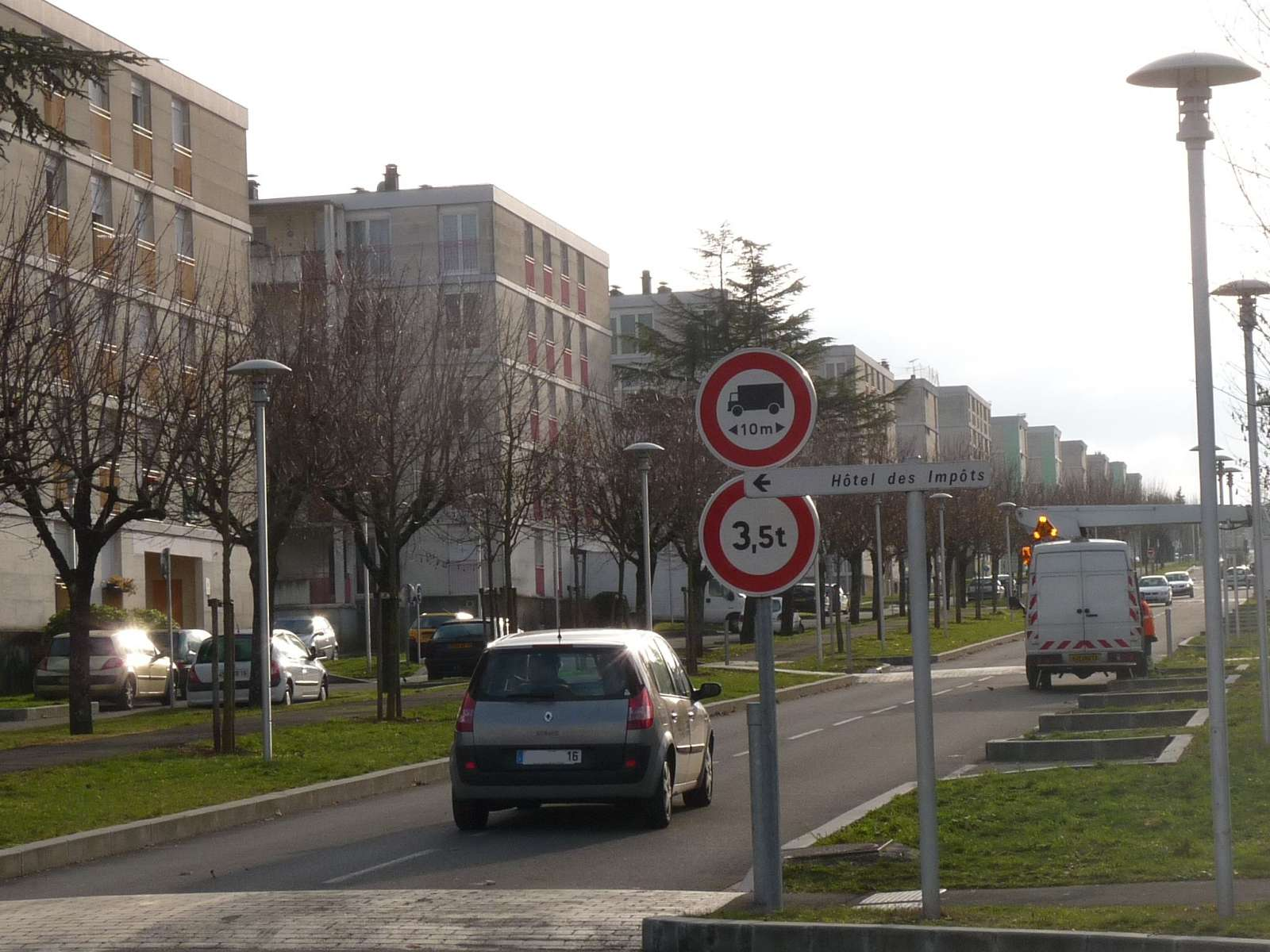 cité du Champ de Manoeuvres, Soyaux, Charente, France